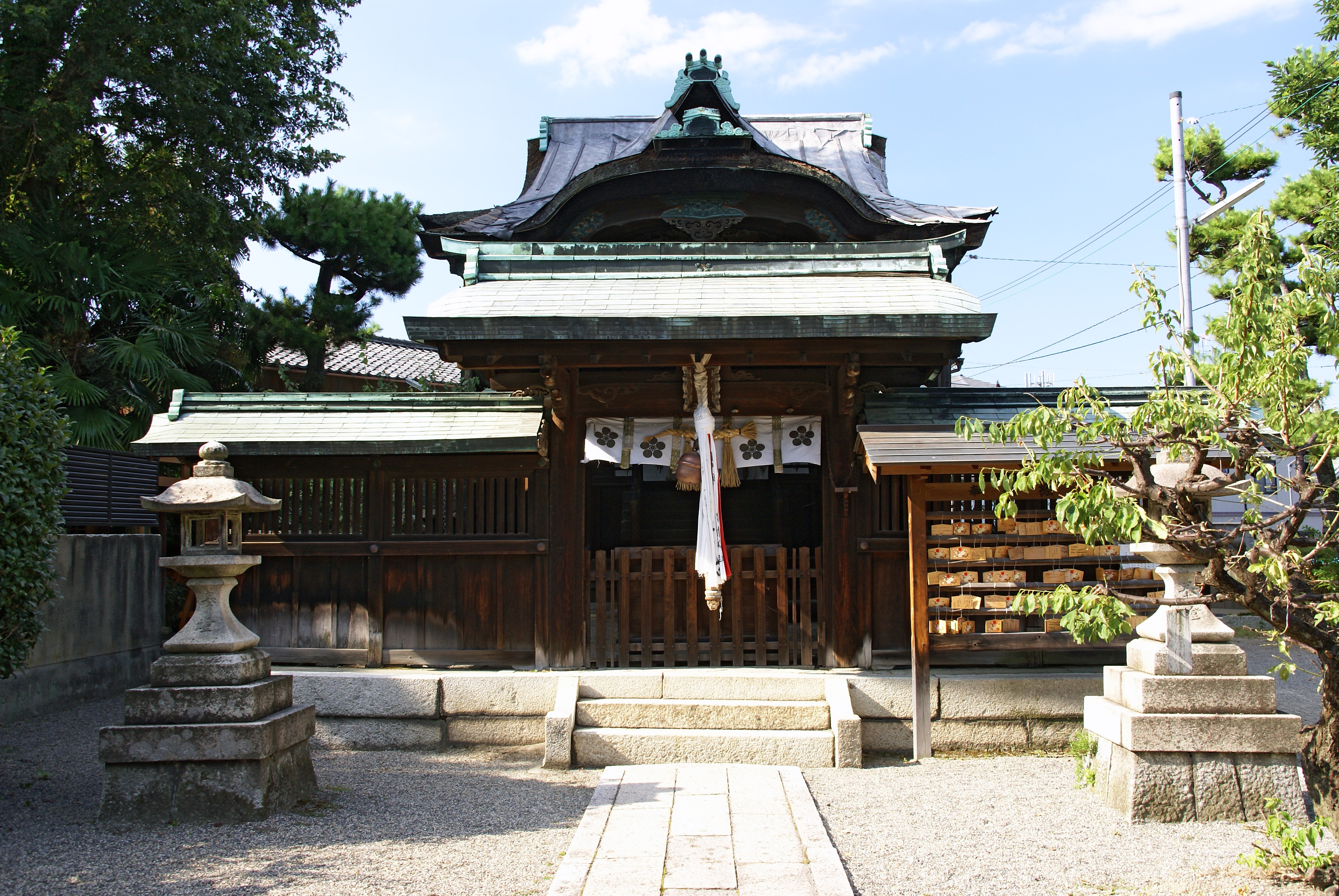 Tenmangu in Moriyama, Shiga prefecture, Japan